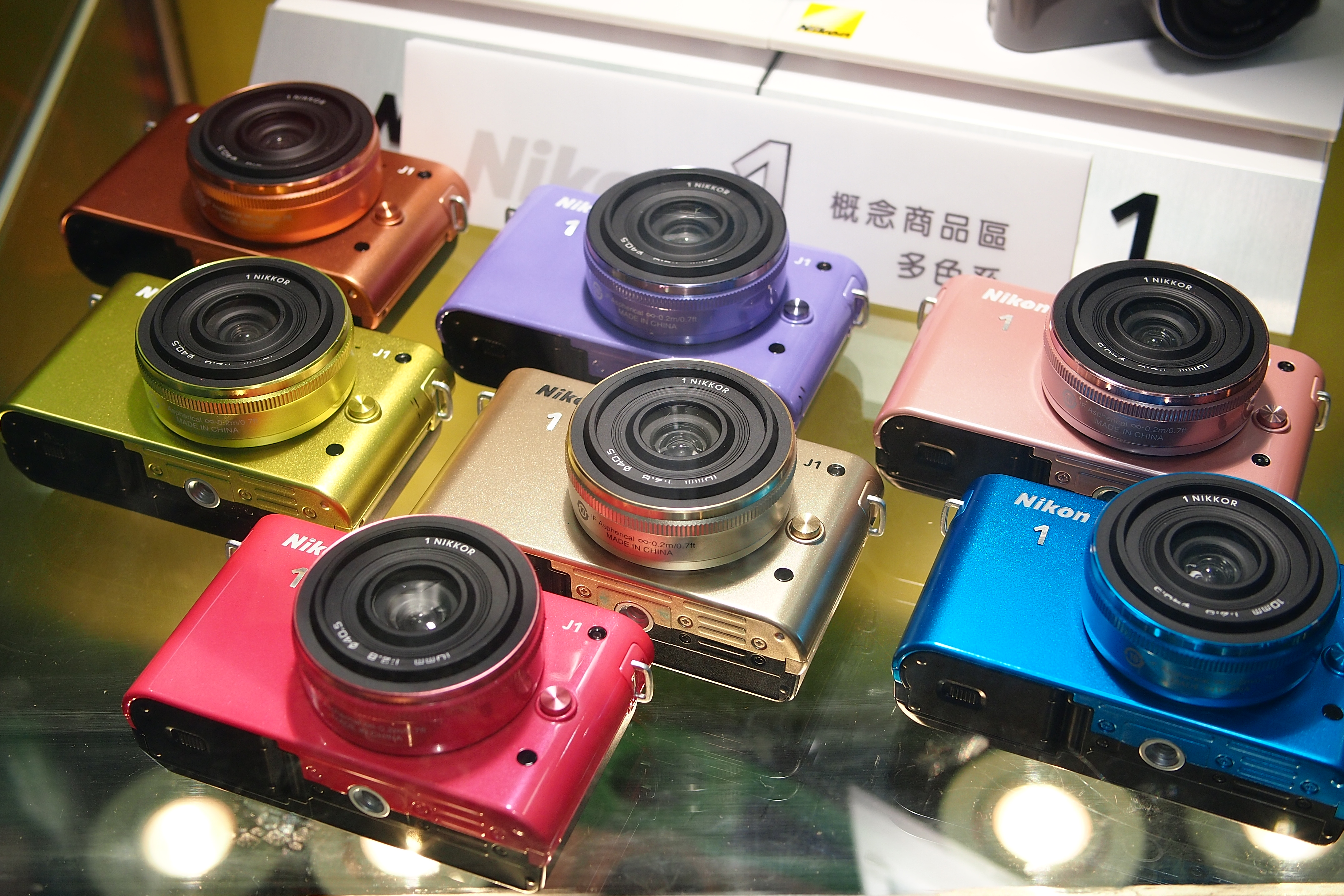 中文（台灣）: 2011台北國際數位攝影器材暨影像大展，Nikon 1 J1靜態展示。